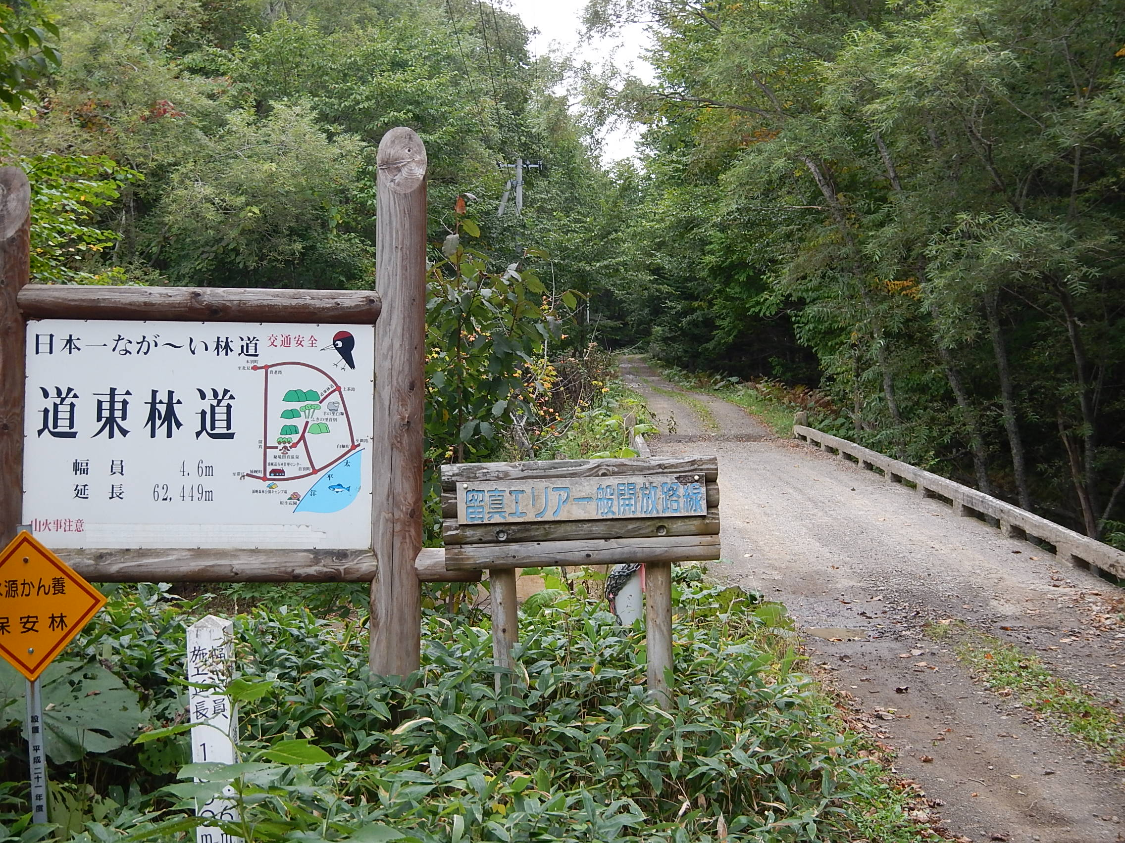 道東林道 浦幌町留真側